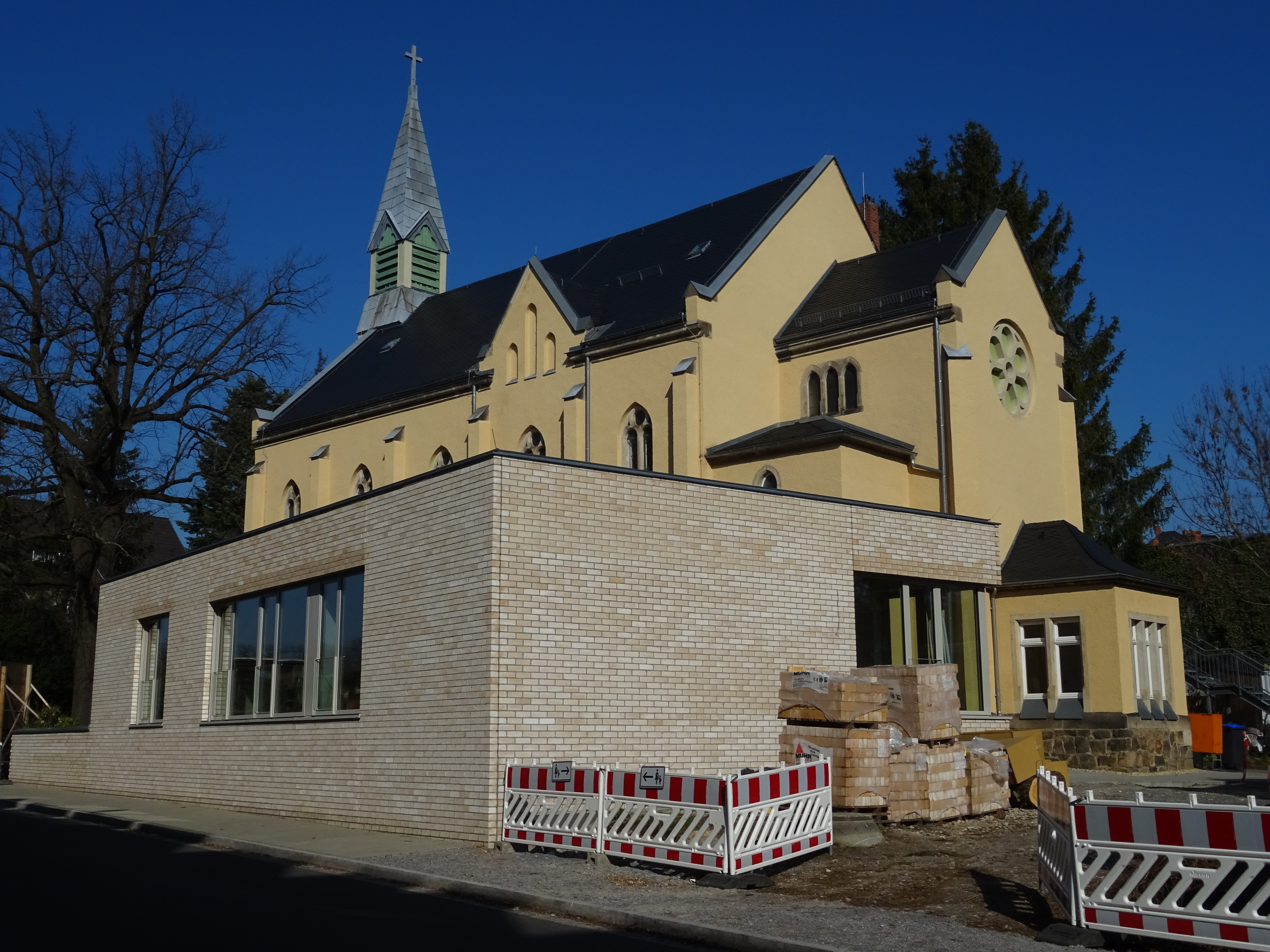 Katholische Kirche in Radeberg, erbaut von 1882 bis 1883 in neogotischen Stil. Derzeit finden Renovierungsarbeiten statt (21.03.2019)